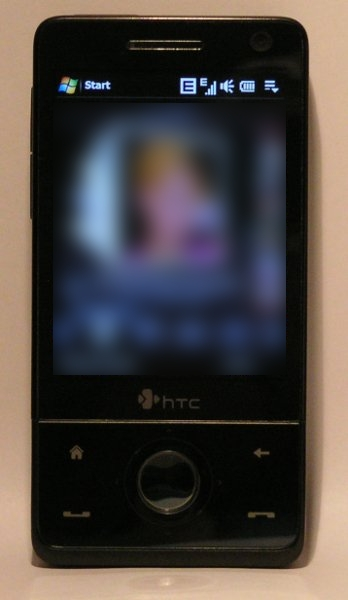 HTC Touch Pro